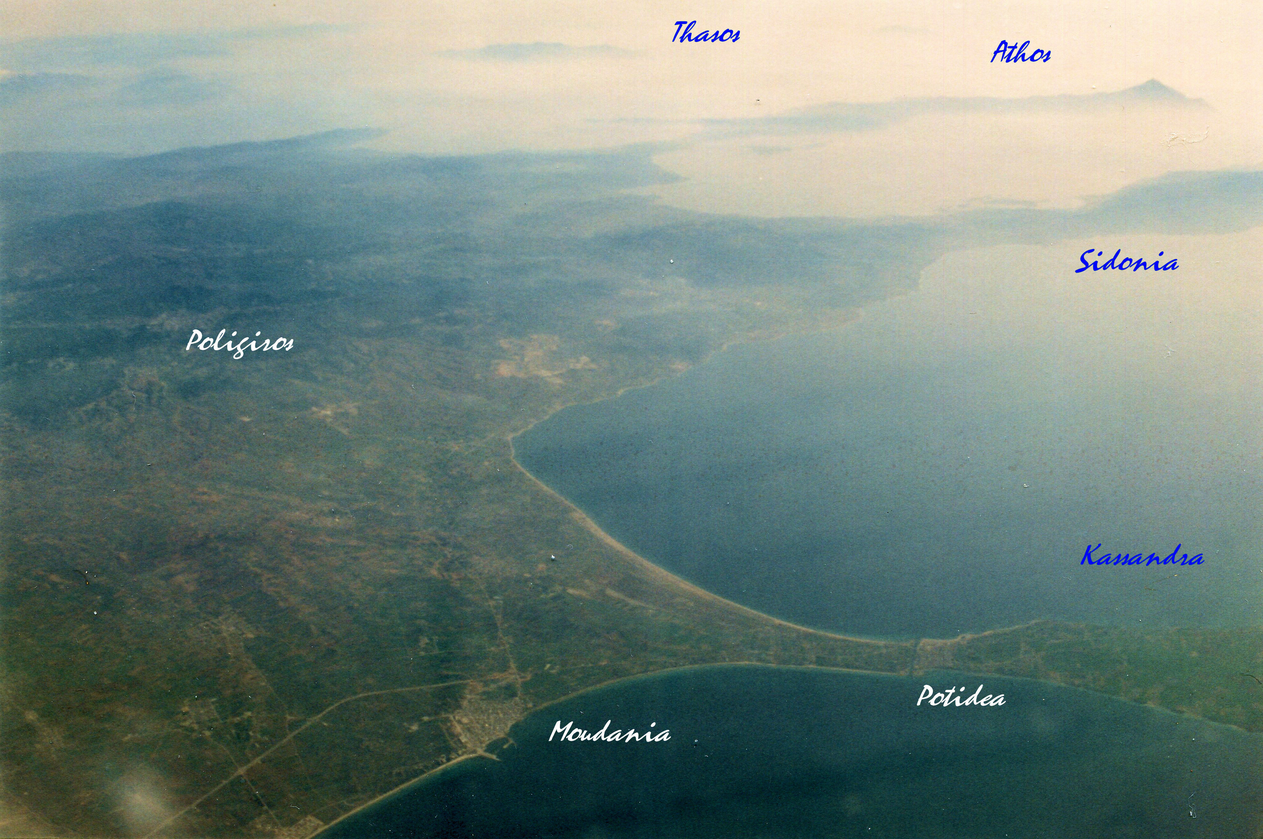 Chalkidiki, Luftaufnahme (aus SW)